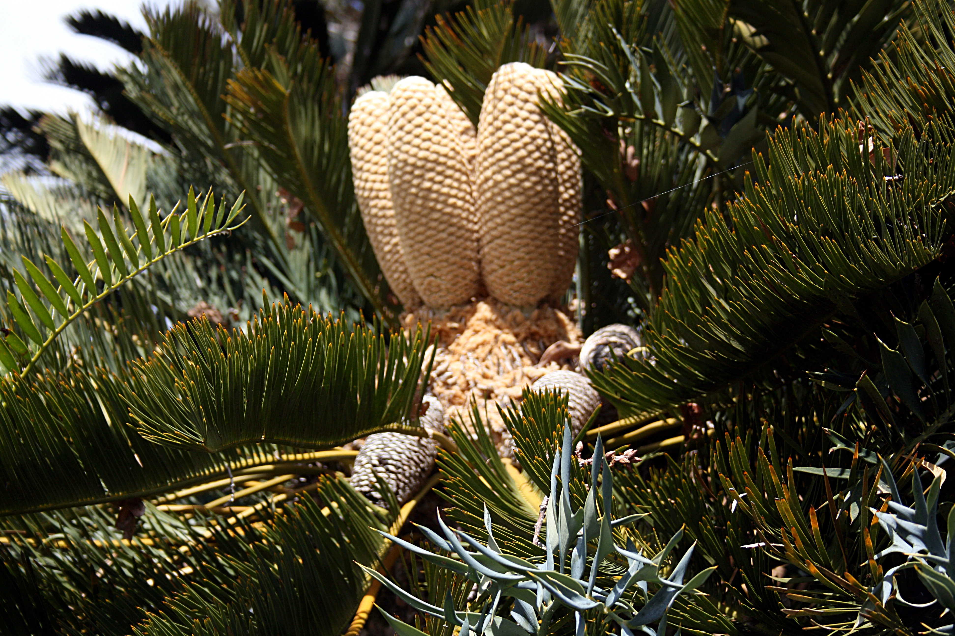 Monte (Funchal) - Encephalartos friderici-guilielmi Lehm. (Brotpalmfarn)